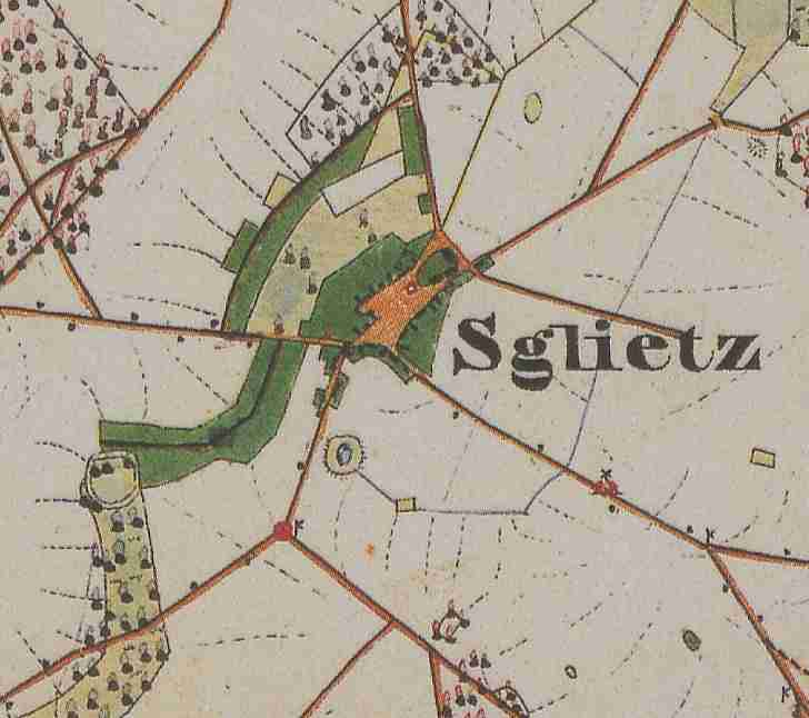 Glietz, bis 1938 Sglietz, Ortsteil der Gemeinde Märkische Heide, Landkreis Dahme-Spreewald, Brandenburg, Deutschland, Ausschnitt aus dem Urmesstischblatt 3950 Groß Leuthen von 1846